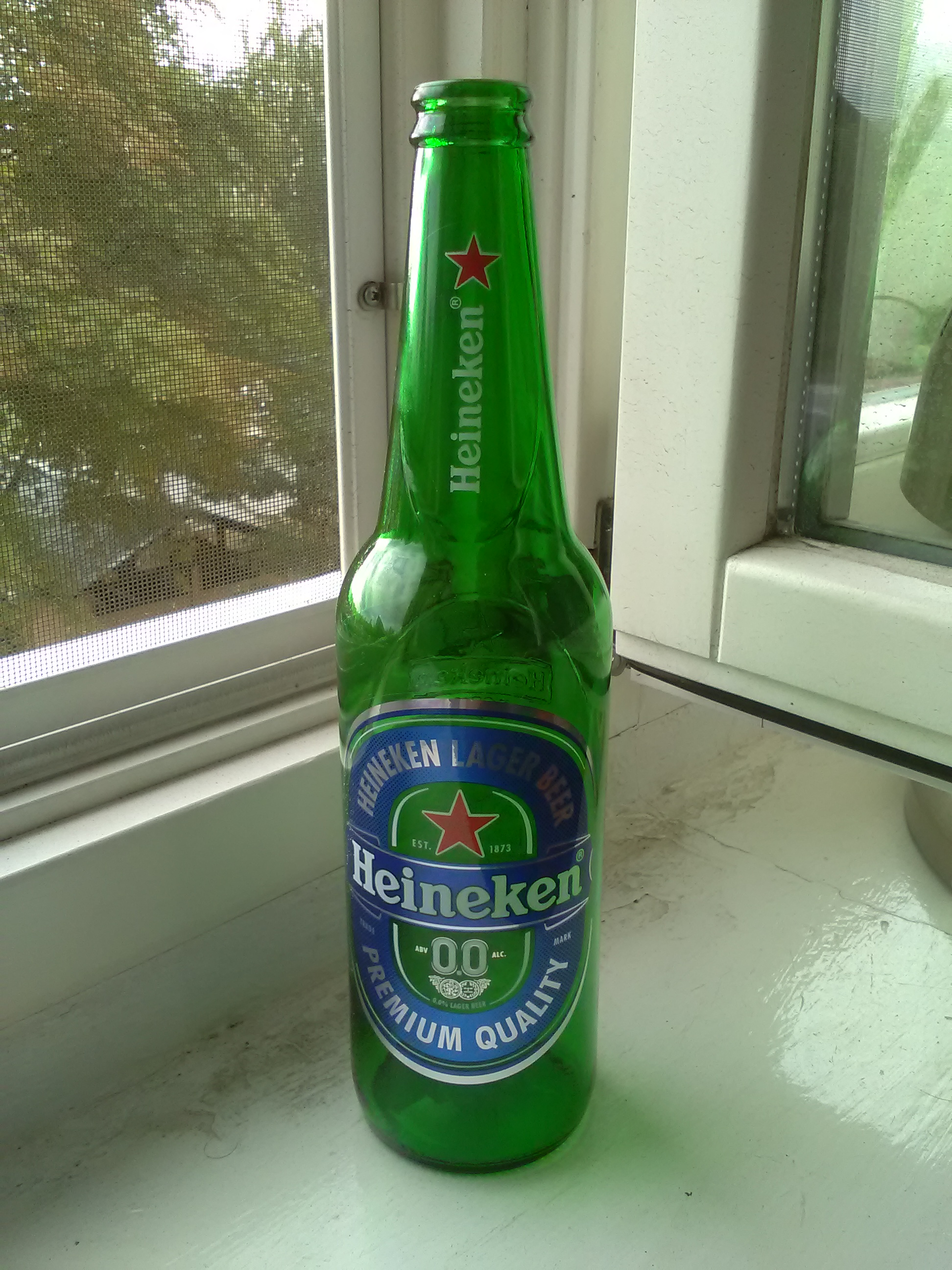 Piwo bezalkoholowe Heineken.